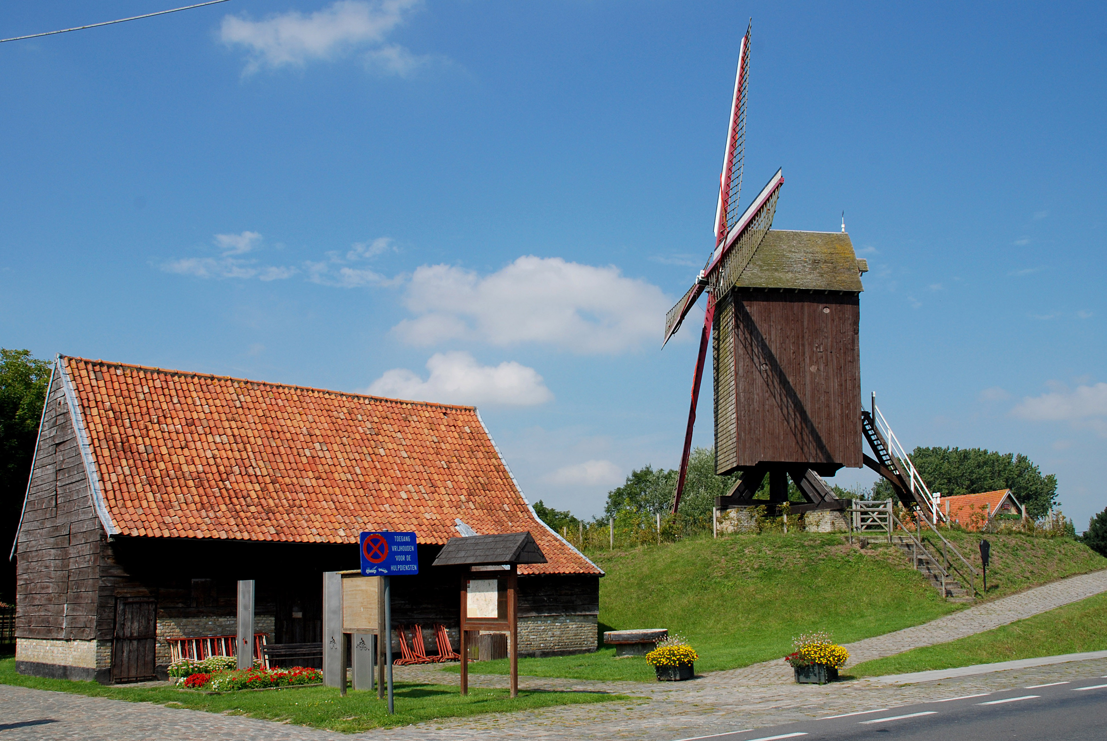 Oostvleteren onroerend erfgoed ID 31572